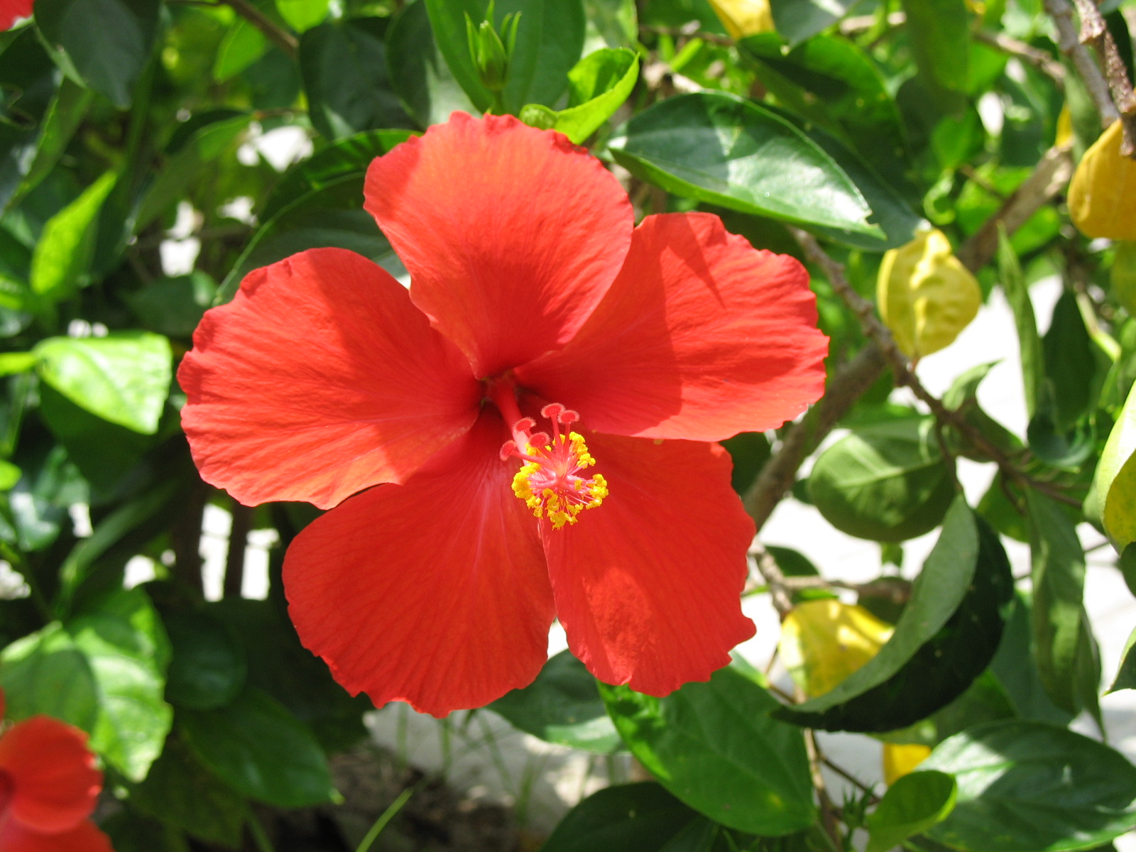 Cayena zuliana